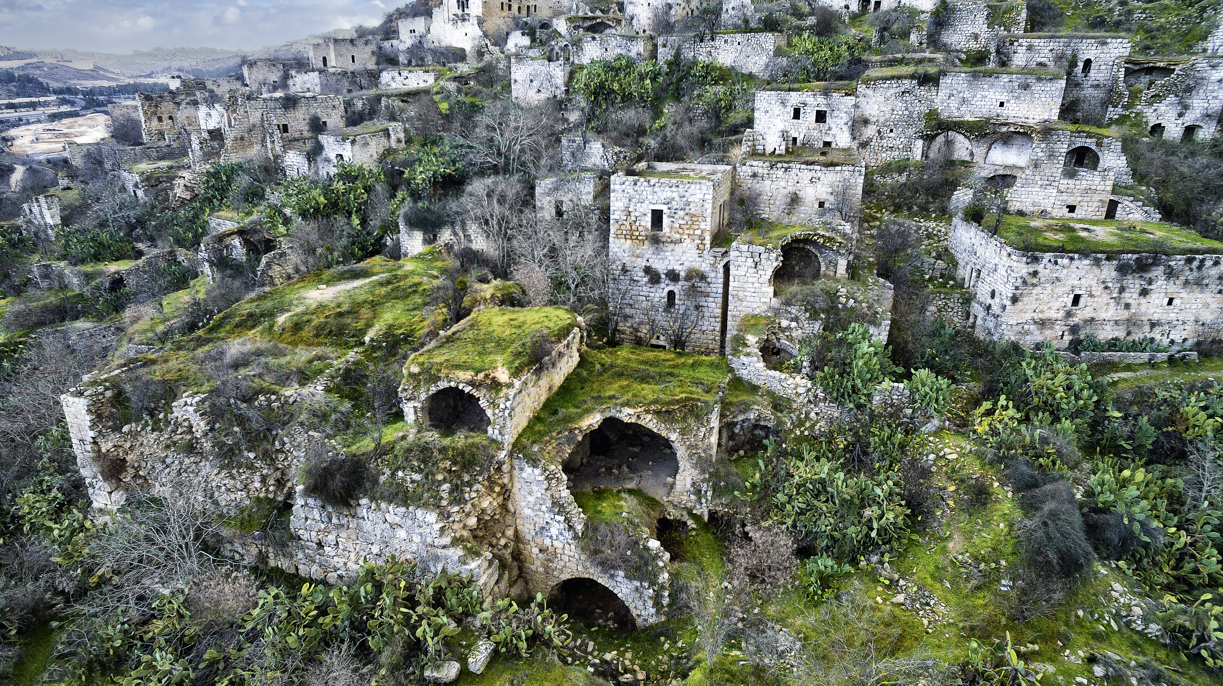 שרידי יישוב ליד מעיין. על-פני השטח נראים שרידי כפר ערבי שננטש בשנת 1948.